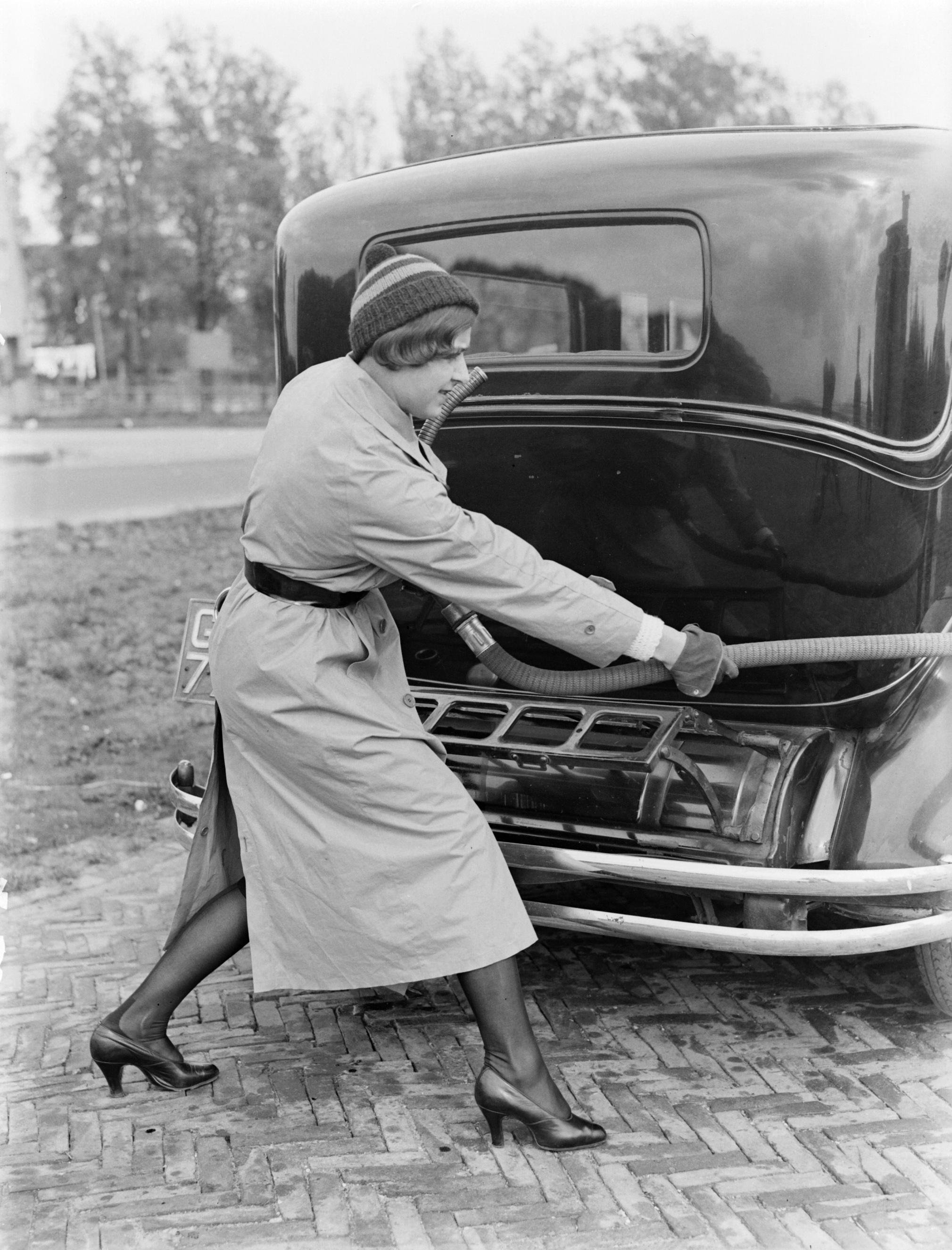 Collectie / Archief : Fotocollectie Van de Poll Reportage / Serie : Reportage fotomodel Beschrijving : Actrice en fotomodel Cissy van Bennekom trekt aan benzineslang, bij auto Datum : 1932 Trefwoorden : auto's, benzine Persoonsnaam : Bennekom, Cissy van Fotograaf : Poll, Willem van de Auteursrechthebbende : Nationaal Archief Materiaalsoort : Glasnegatief Nummer archiefinventaris : bekijk toegang 2.24.14.02 Bestanddeelnummer : 252-0489